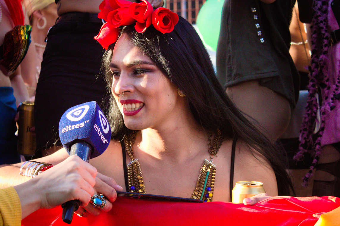 Location: Argentina, Rosario Event type: Marcha del Orgullo de Rosario Date or year: 2018Enlace a la nota